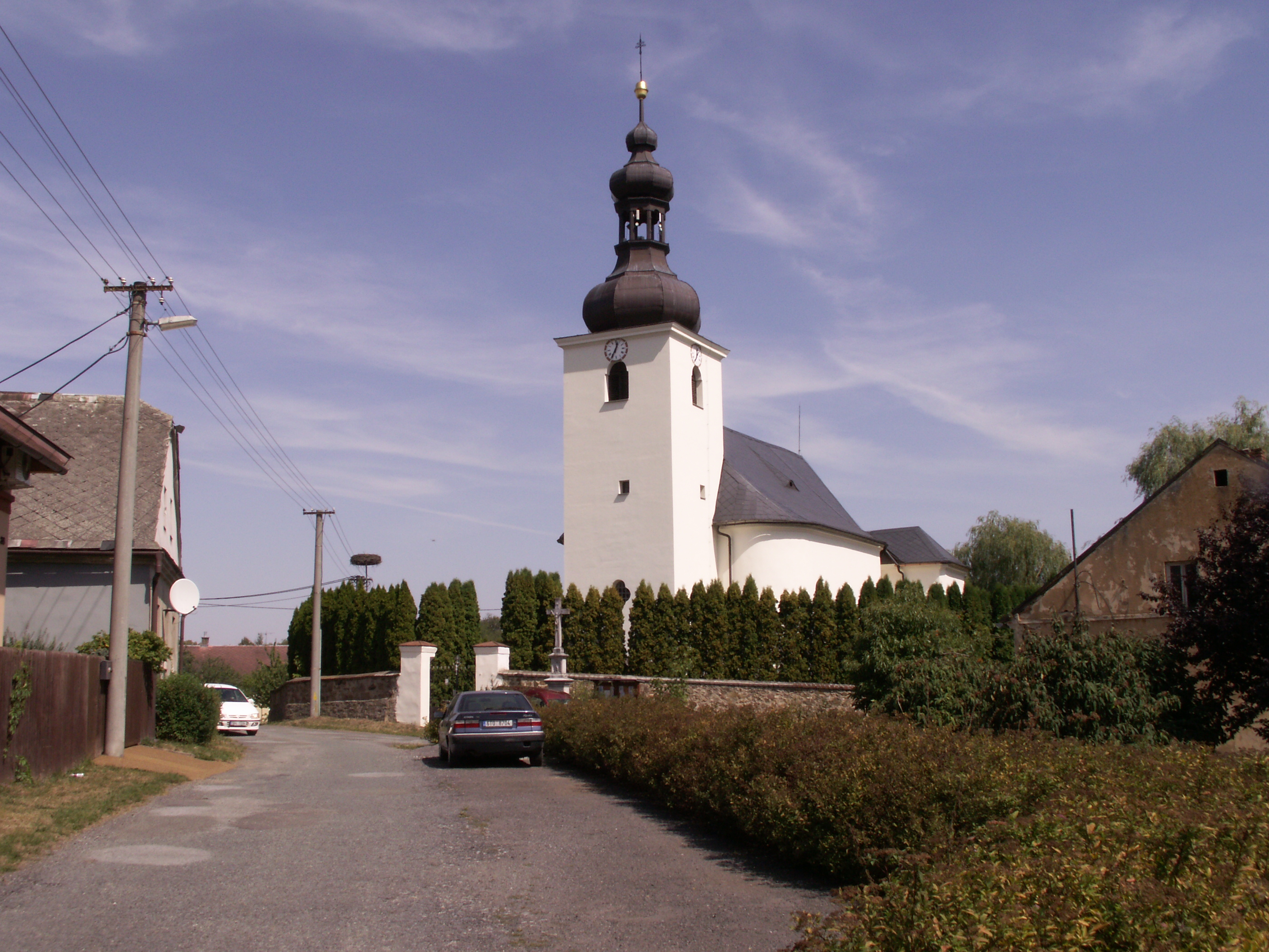 Vysoká, okres Bruntál, kraj Moravskoslezský, kostel svatého Urbana